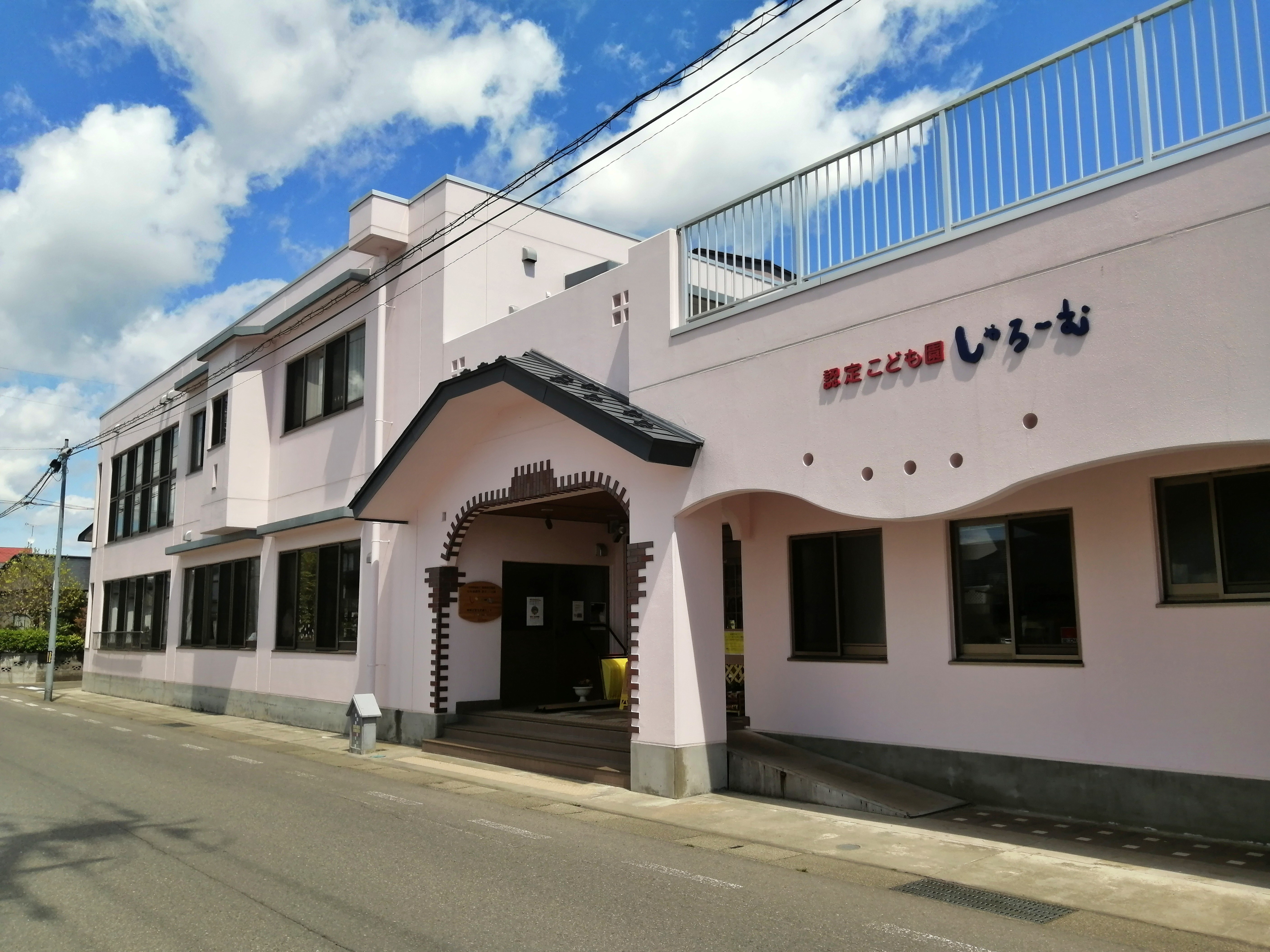 幼保連携型認定こども園しゃろーむ(北秋田市東横町)